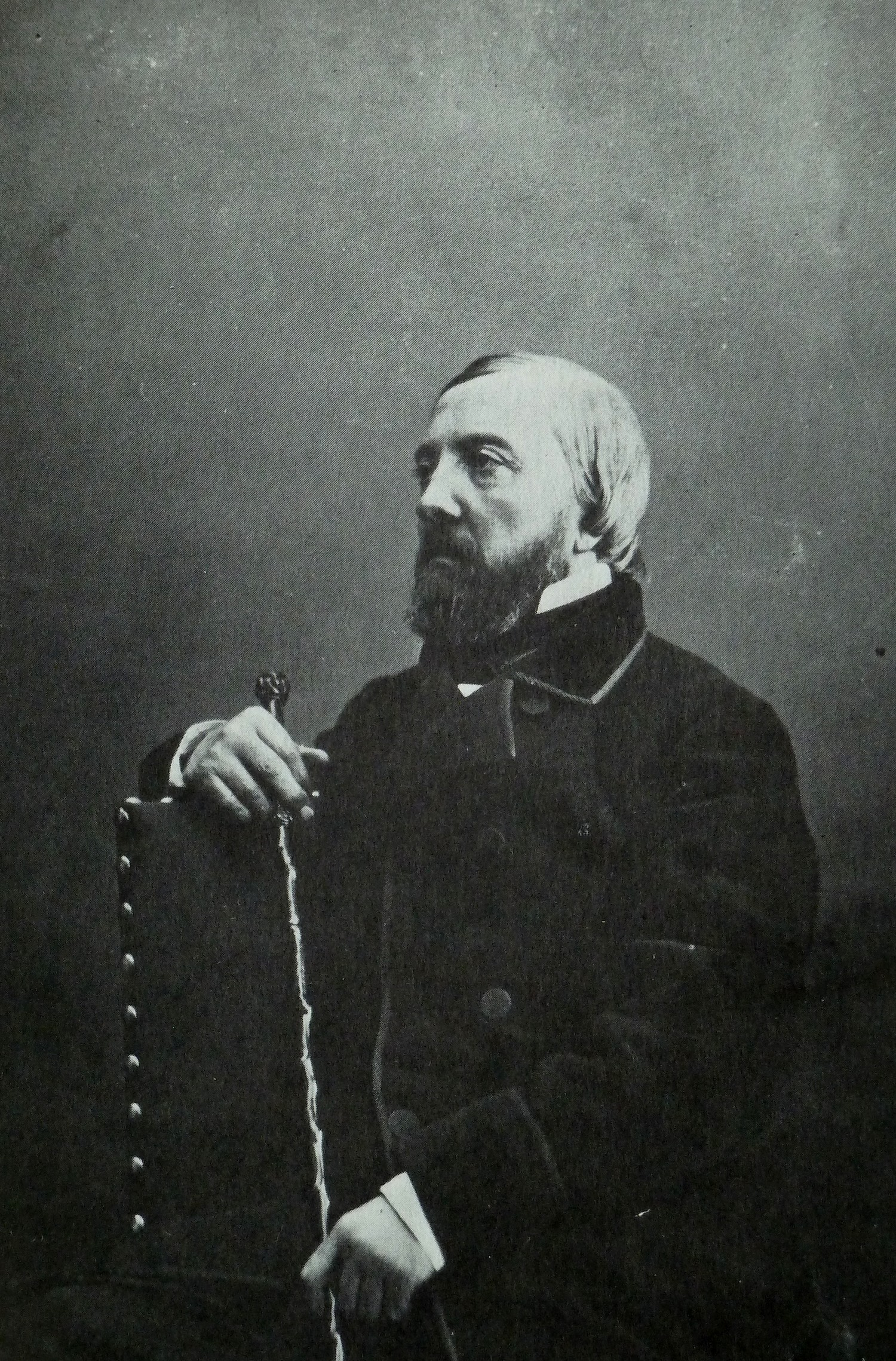 Portrait de Charles Blanc, 1865/70 . Photographie par Nadar. Bibliothèque nationale de France, cabinet des estampes (Na 237/760).